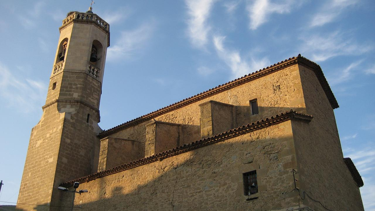 Església de Sant Bartomeu a Alpicat (Segrià, Catalonia)